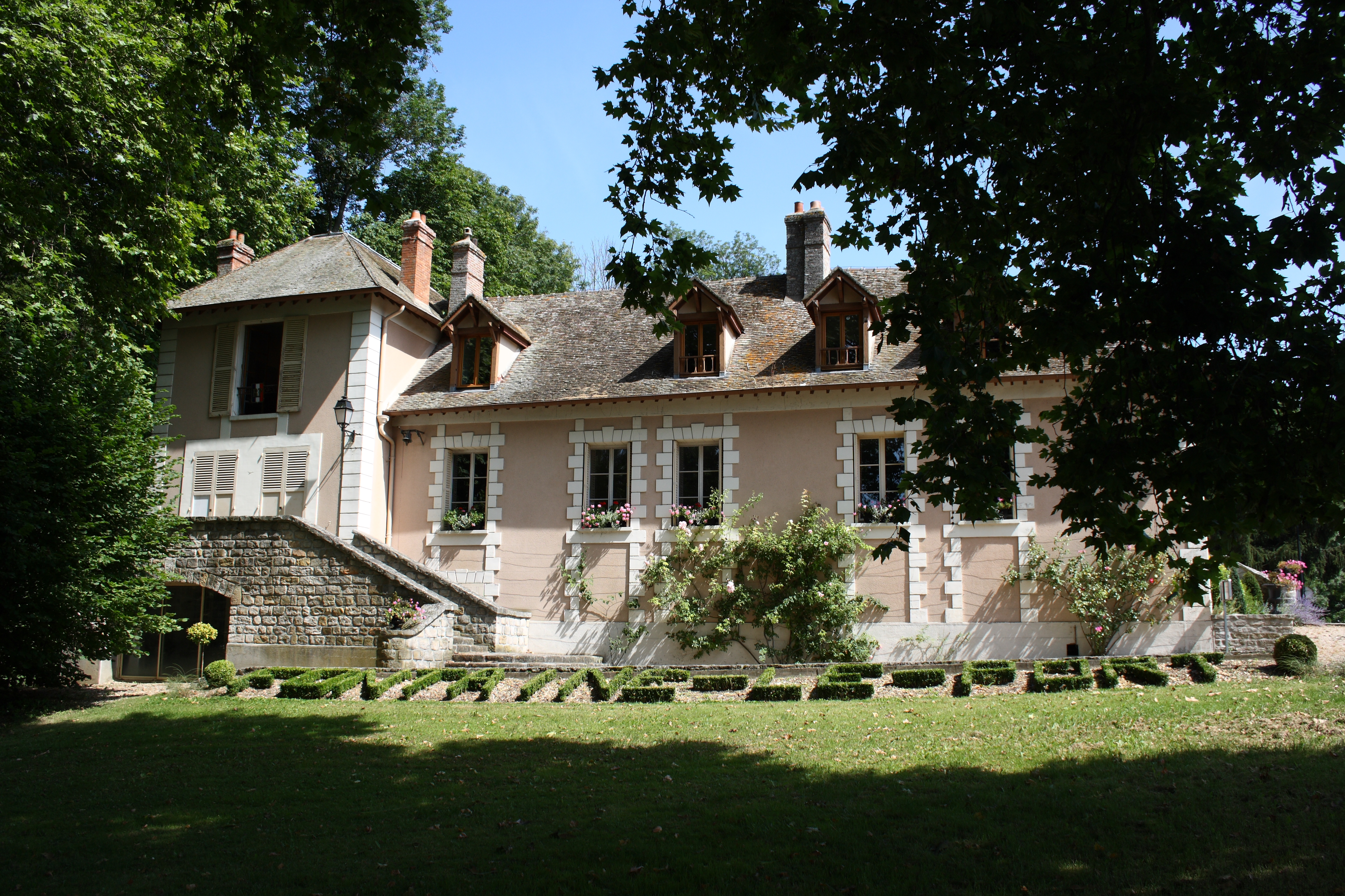 Bürgermeisteramt (Mairie) in Fontaine-le-Port im Département Seine-et-Marne (Île-de-France)